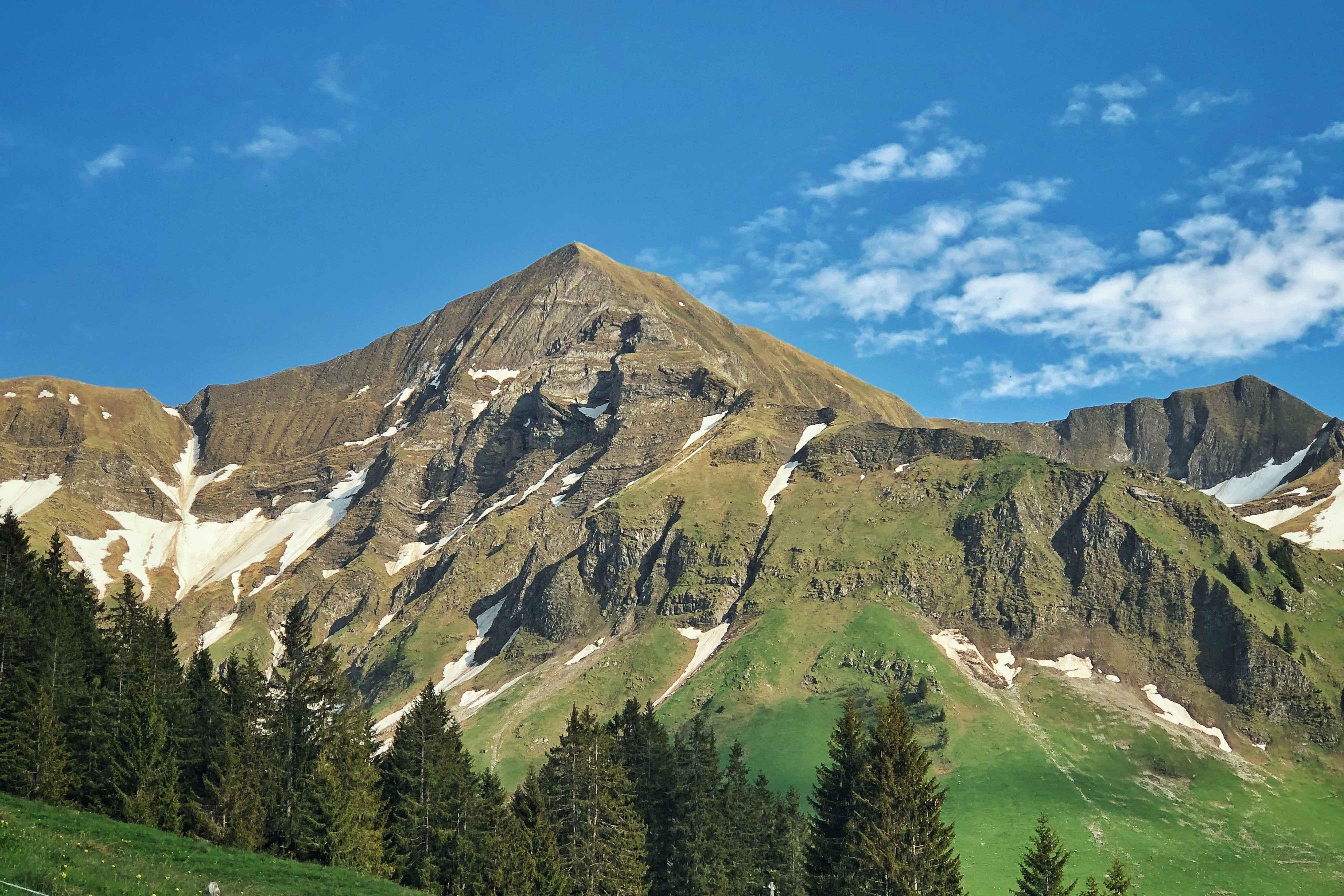 Tannhorn Nordseite in der Nähe von Tannigsboden